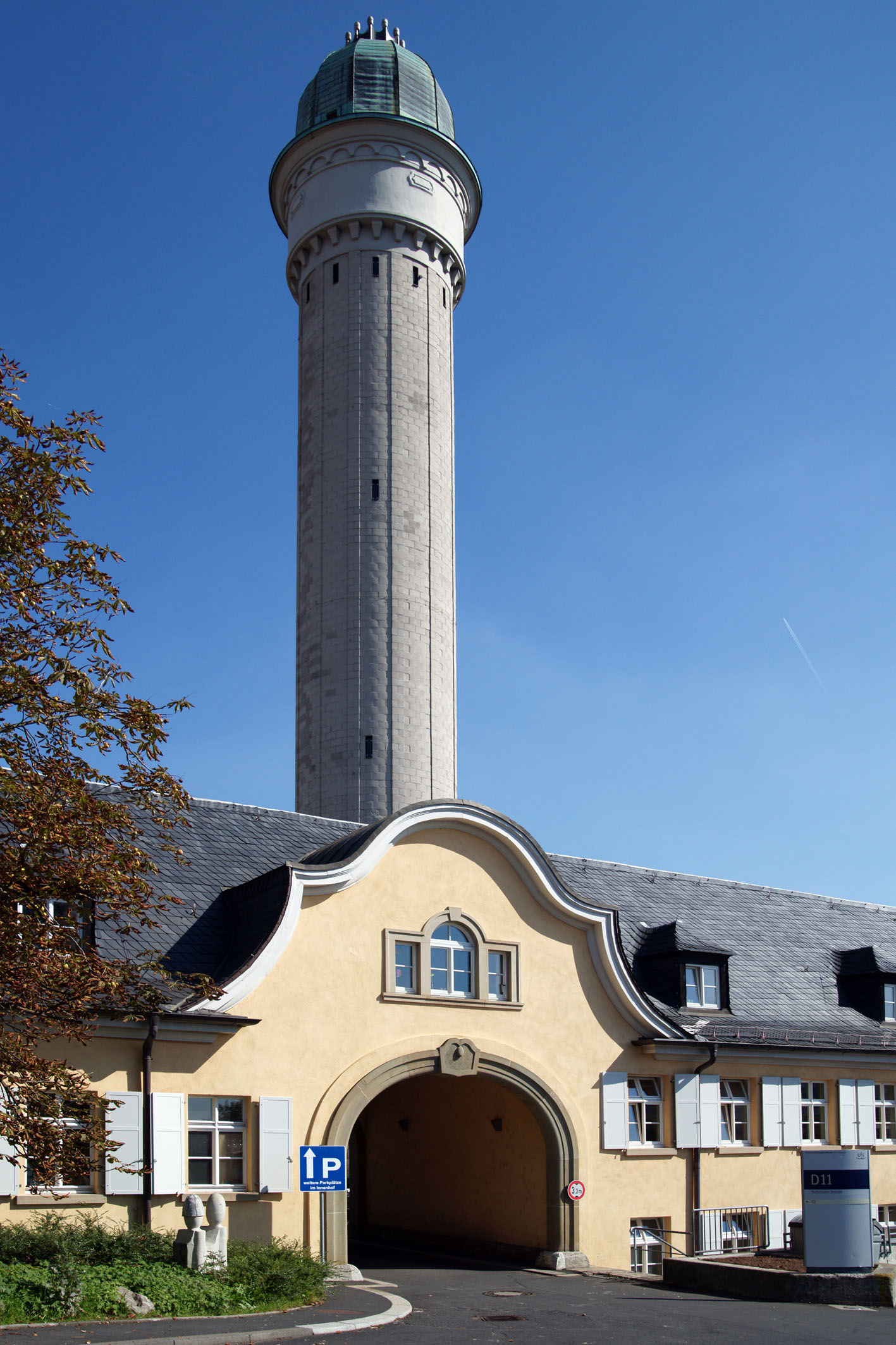 Technischer Betrieb des Universitätsklinikums Würzburg